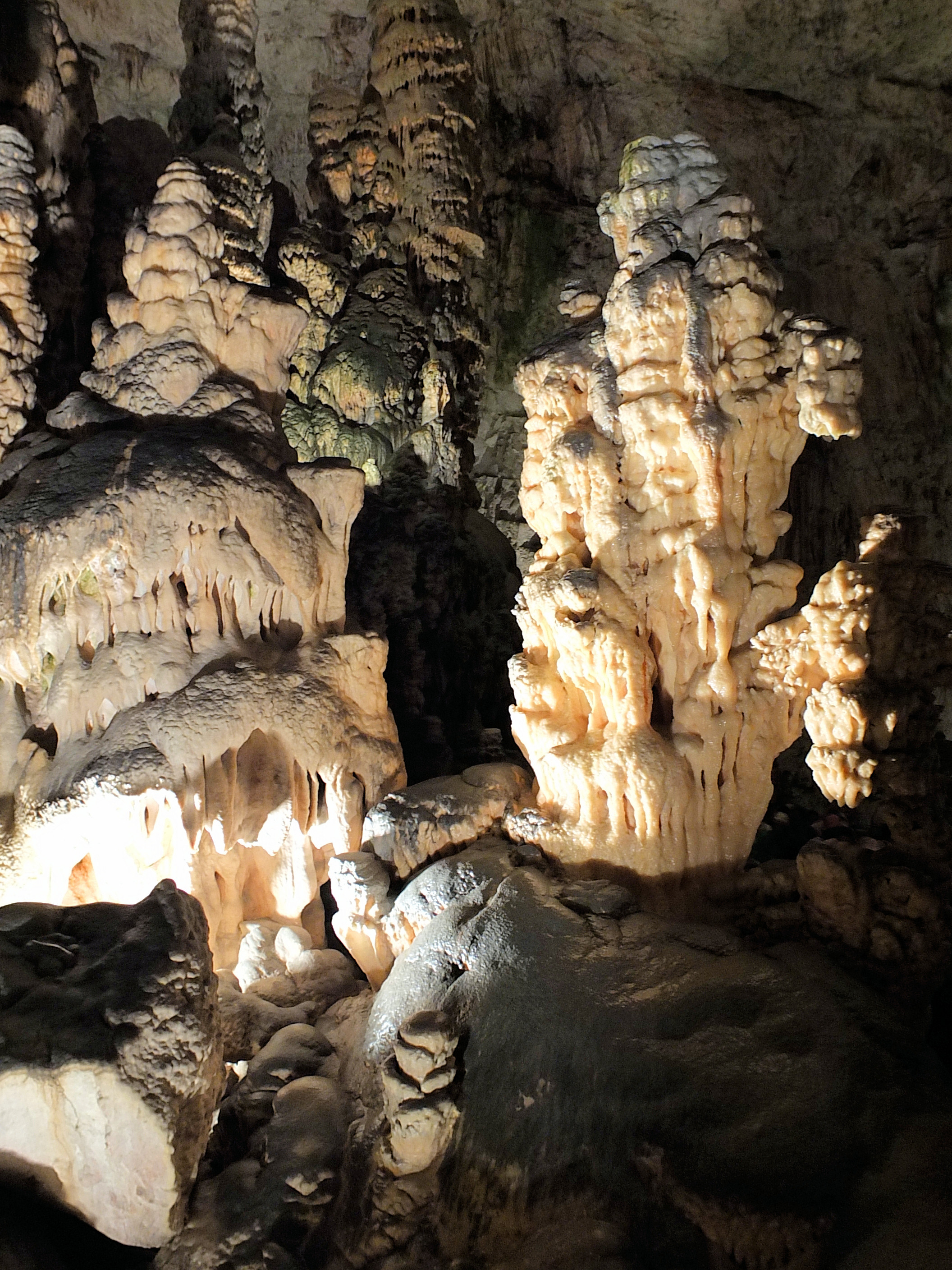 Postojna Caves, Slovenia May 2012